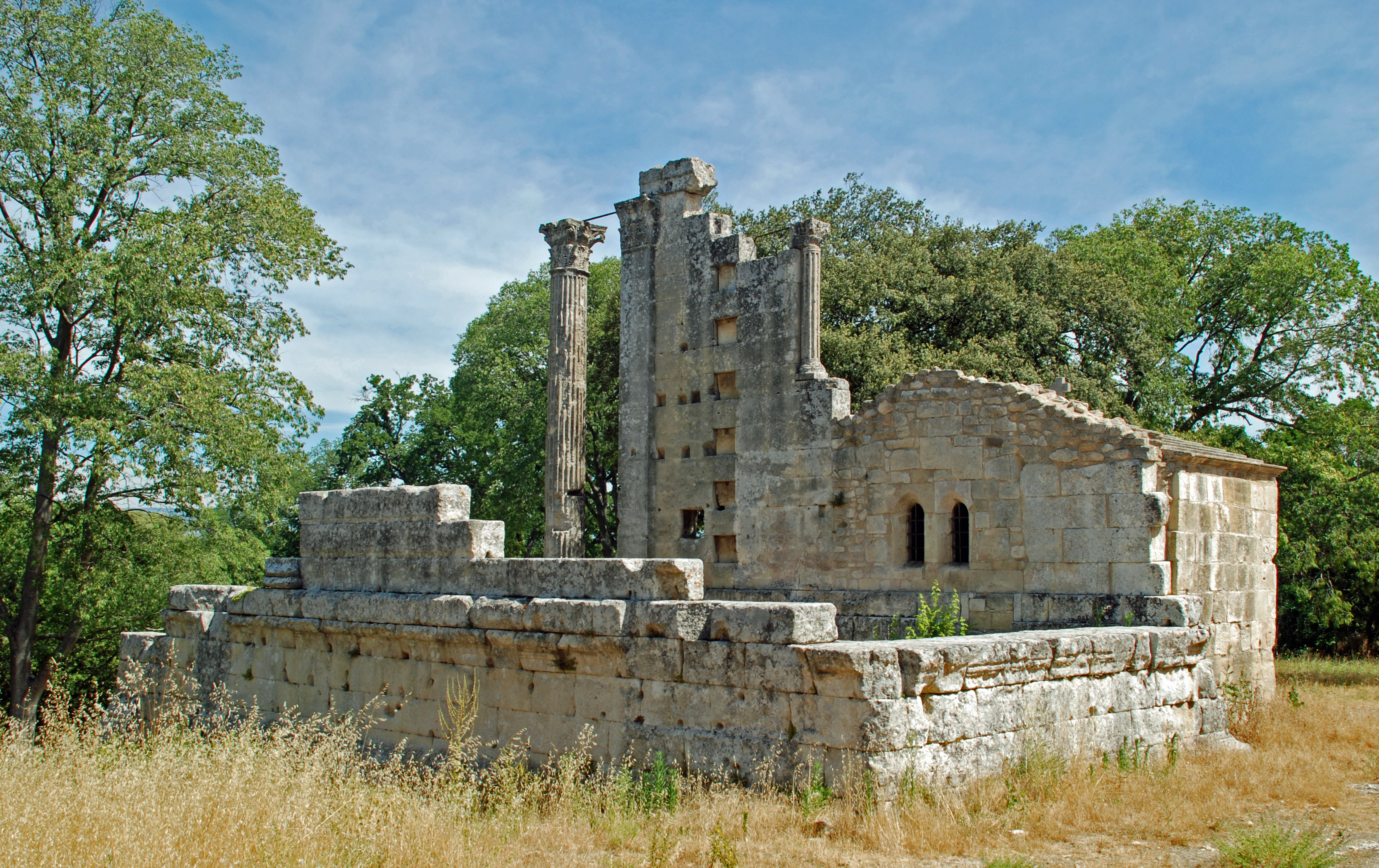 France - Provence - Temple romain de Château-Bas